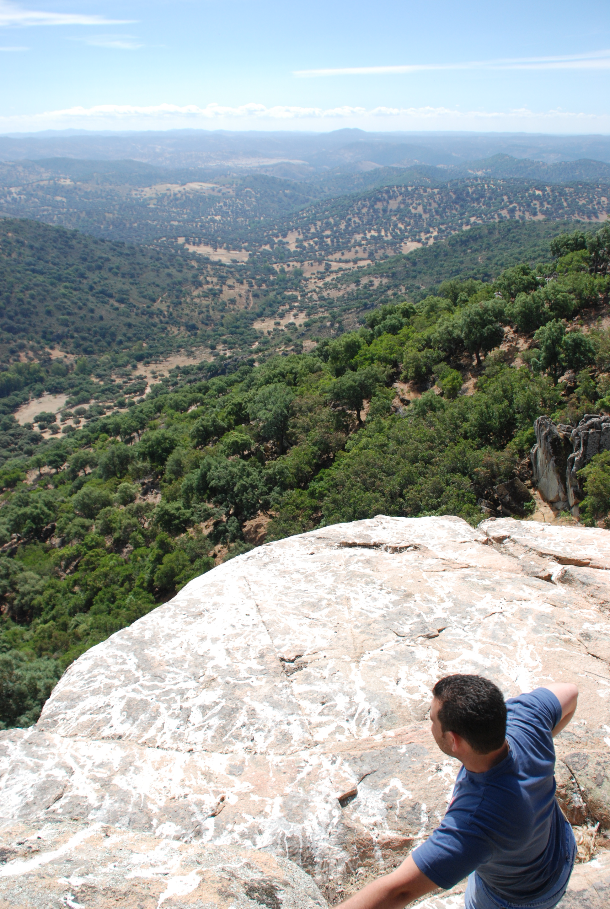 Vista del Parque Natural de la Sierra Norte de Sevilla desde uno d sus puntos más altos